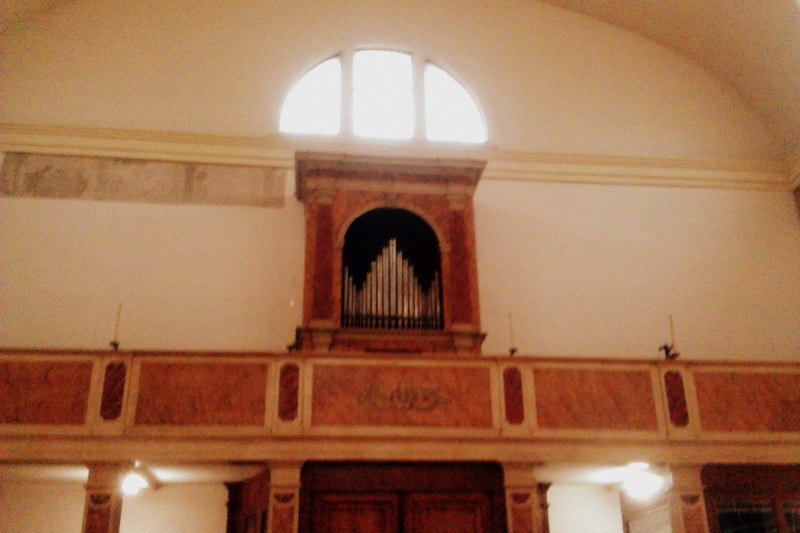 Chiesa di Ognissanti a Padova.